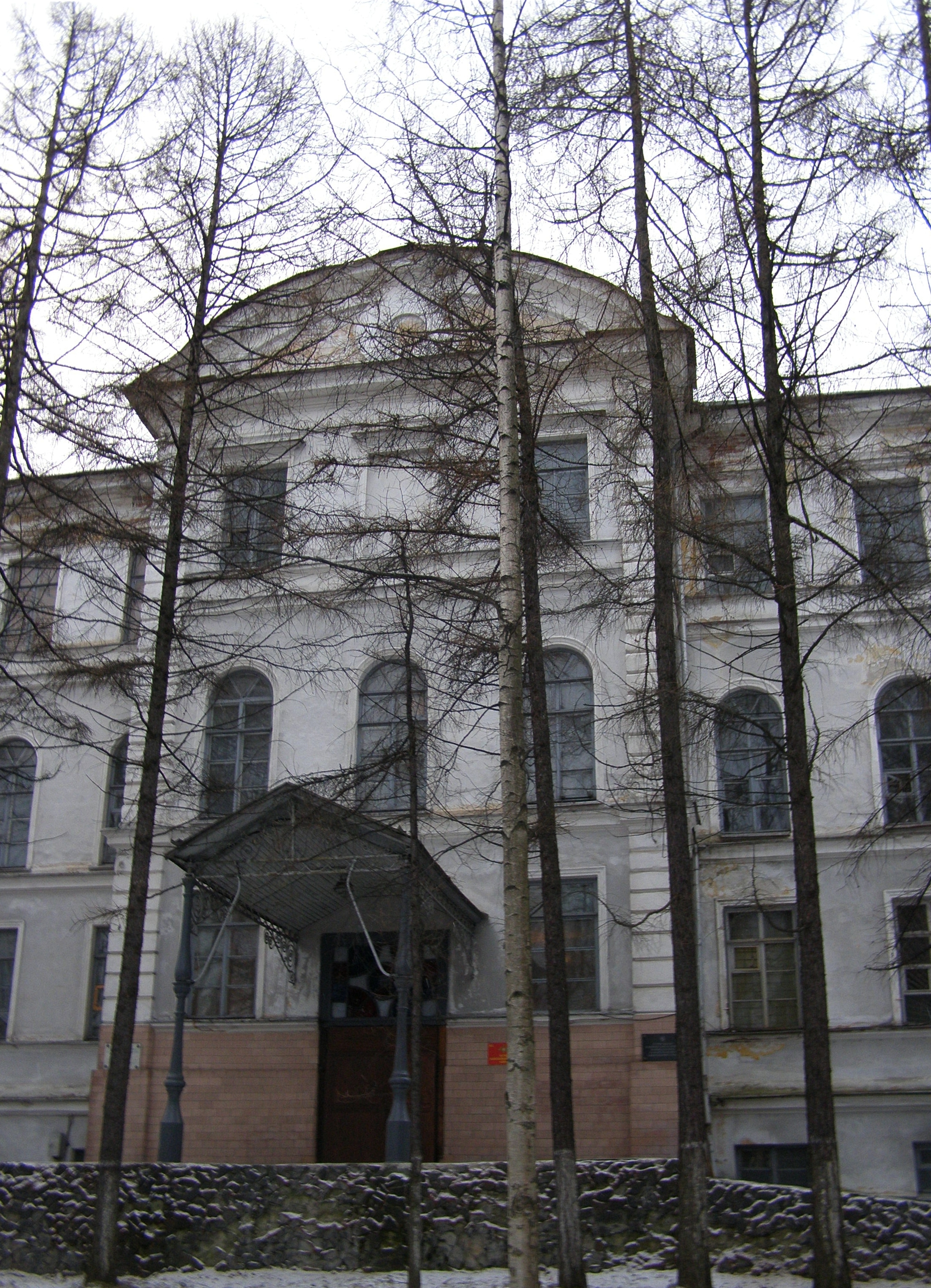 Крыльцо бывшего здания Олонецкой духовной семинарии в Петрозаводске.